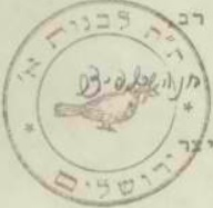 חותמת ת"ת לבנות א' ירושלים עם חתימת חנה שפיצר מנהלת בית הספר